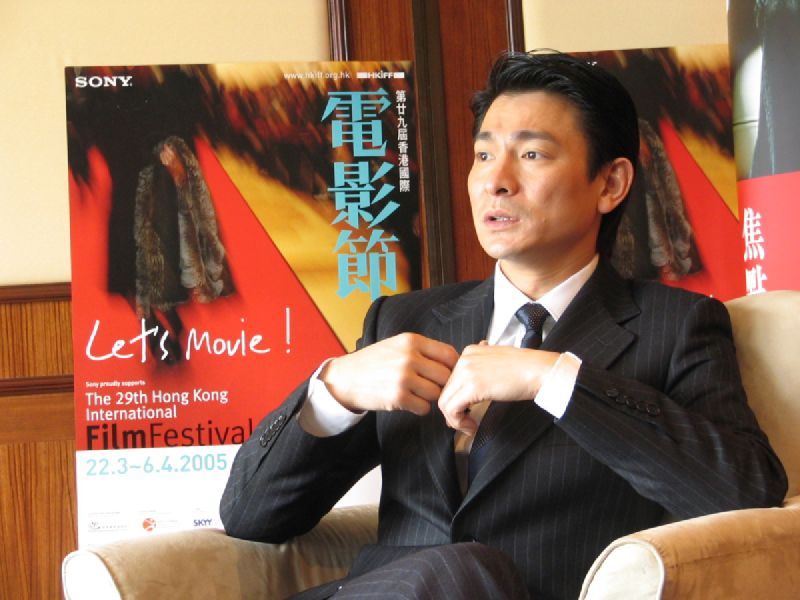 Andy Lau